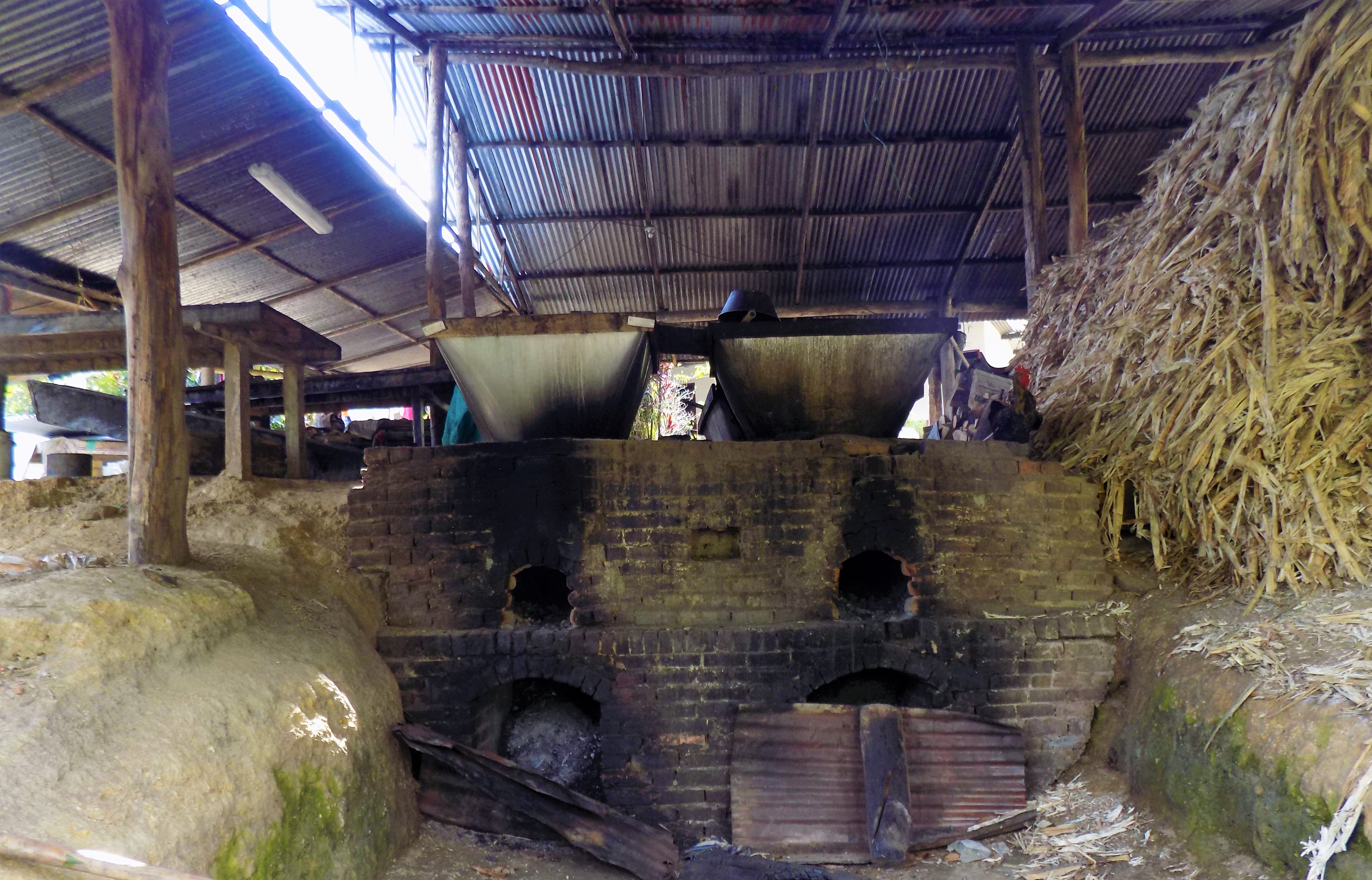 Las comunidades dedicadas al cultivo de caña de azucar y la producción de panela cuentan con una o varias "moliendas" donde se procesa la materia prima para conseguir panela, melcochas, guarapo y otros derivados del jugo de caña